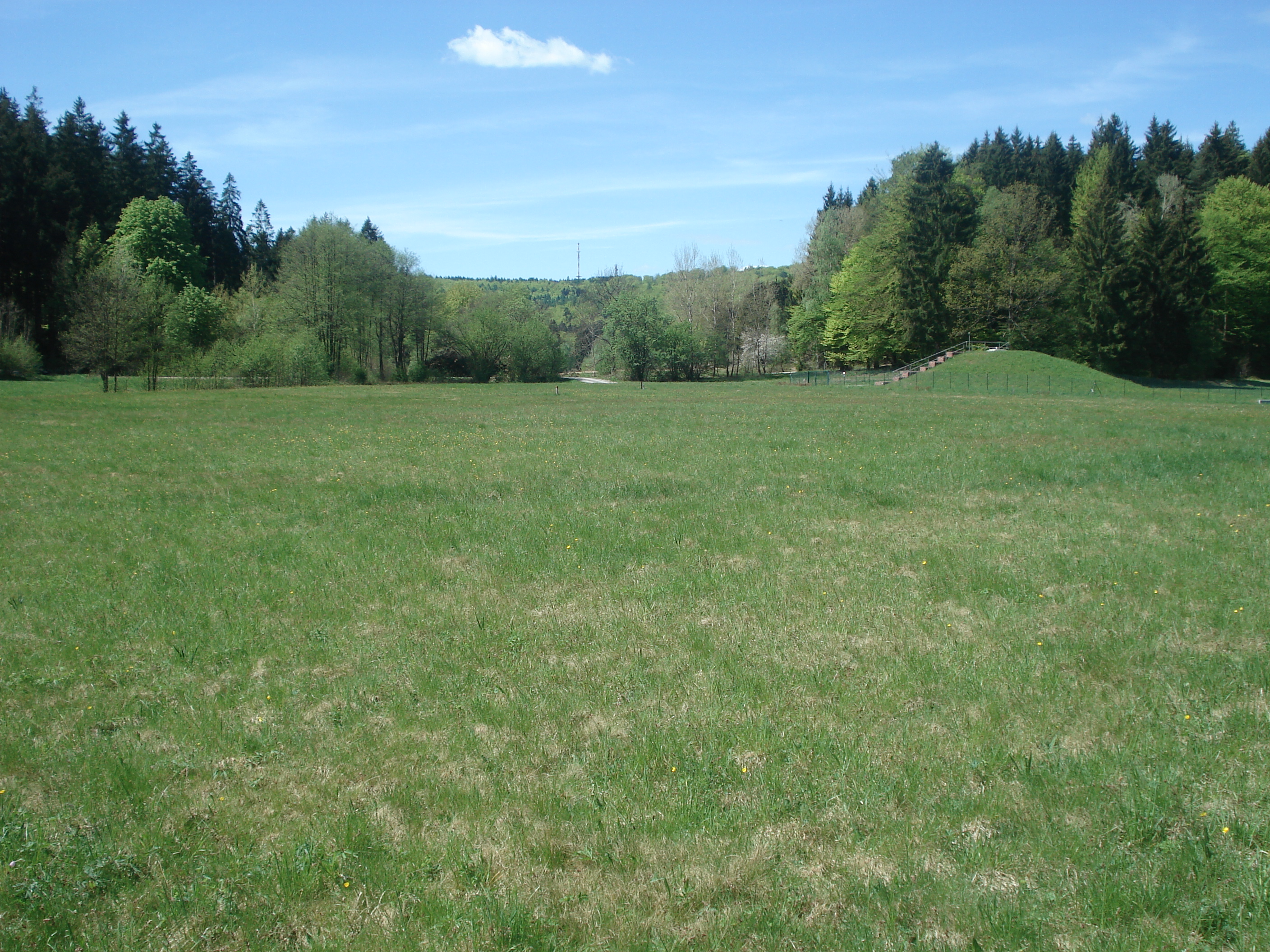 Der Weihersgrund